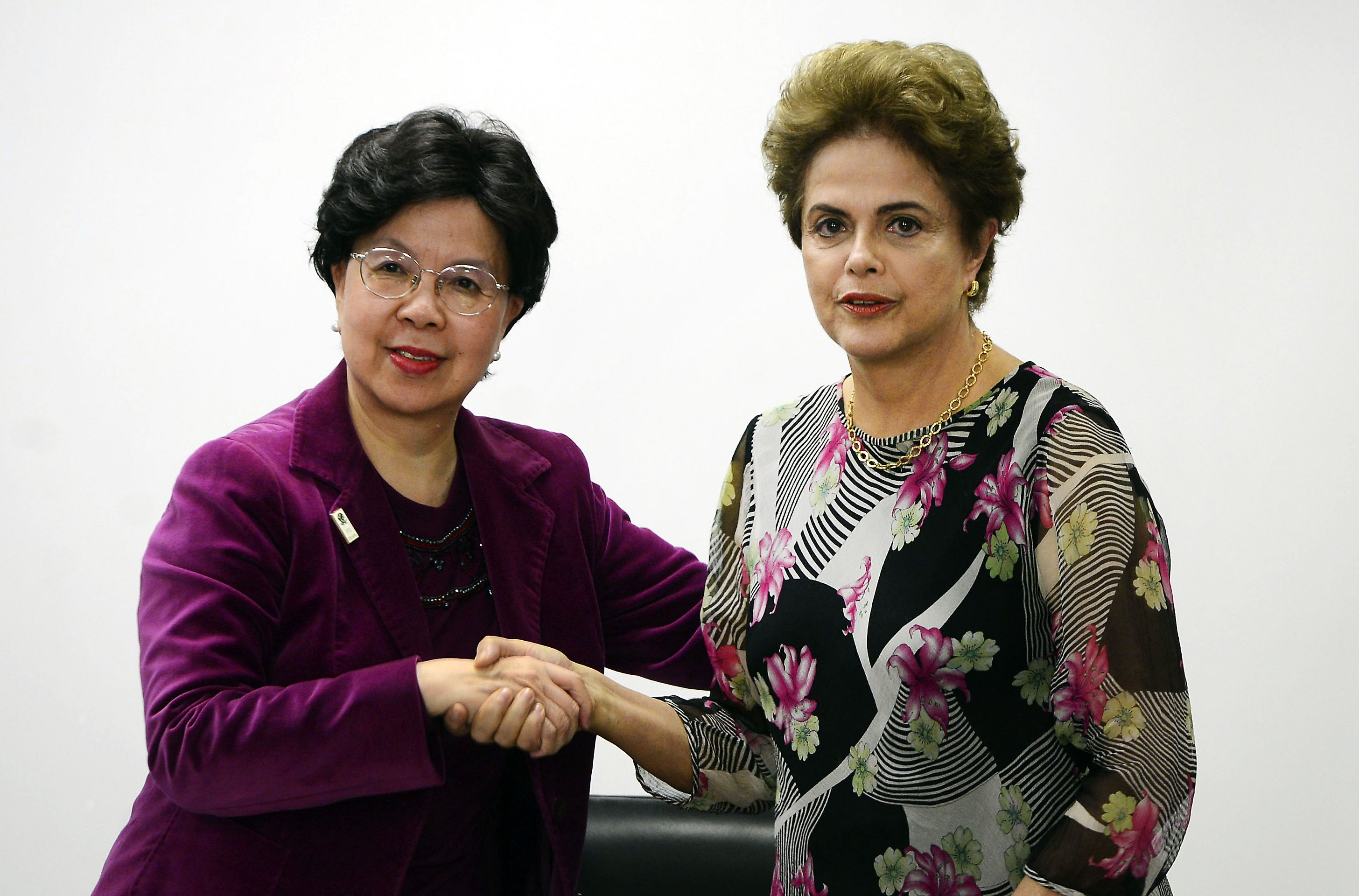 Brasília - A diretora-geral da Organização Mundial da Saúde, Margaret Chan, e a presidenta Dilma Rousseff durante reunião para discutir ações de combate ao Aedes aegypti.